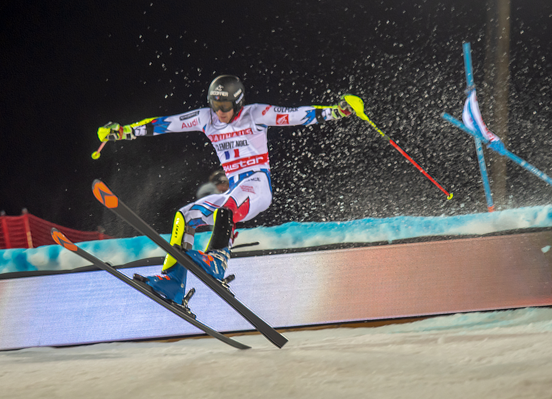 FIS Alpine Skiing World Cup in Stockholm 2019